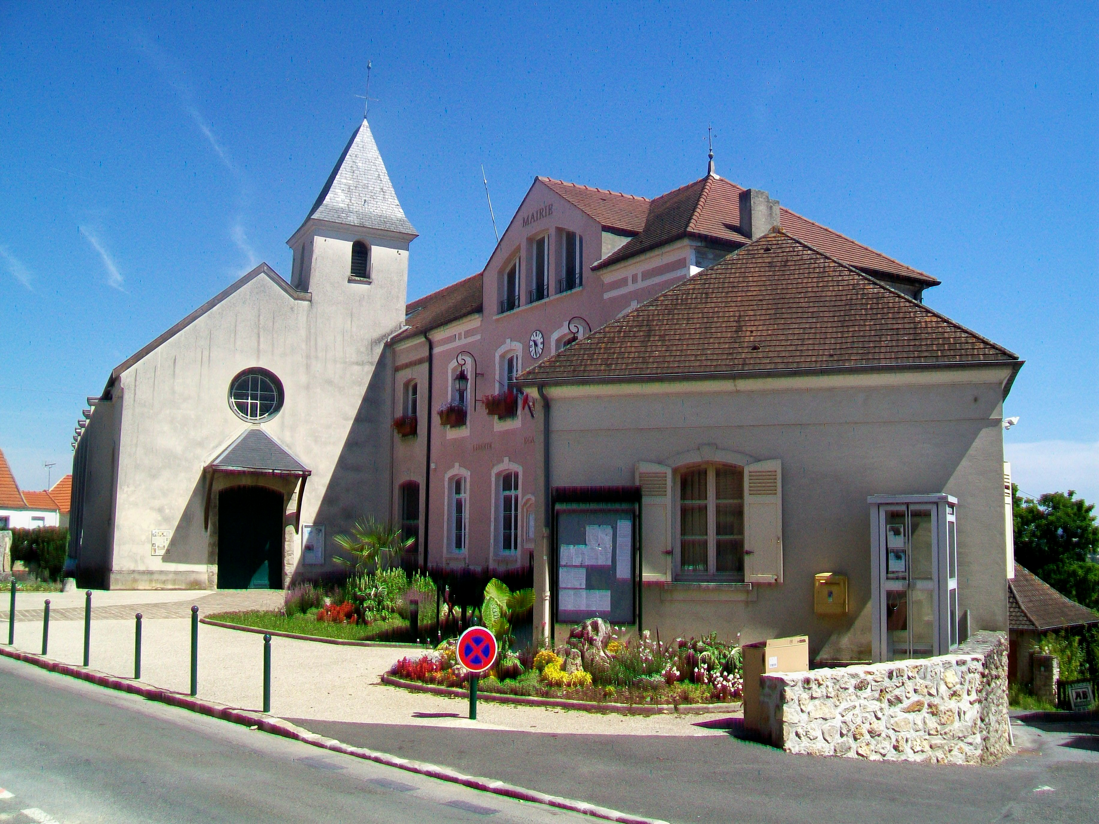 La mairie et l'église Saint-Laurent, rue Jean-Jaurès.